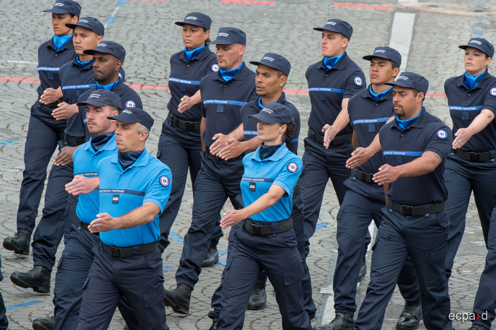 Défilé du 14 juillet 2016 à Paris